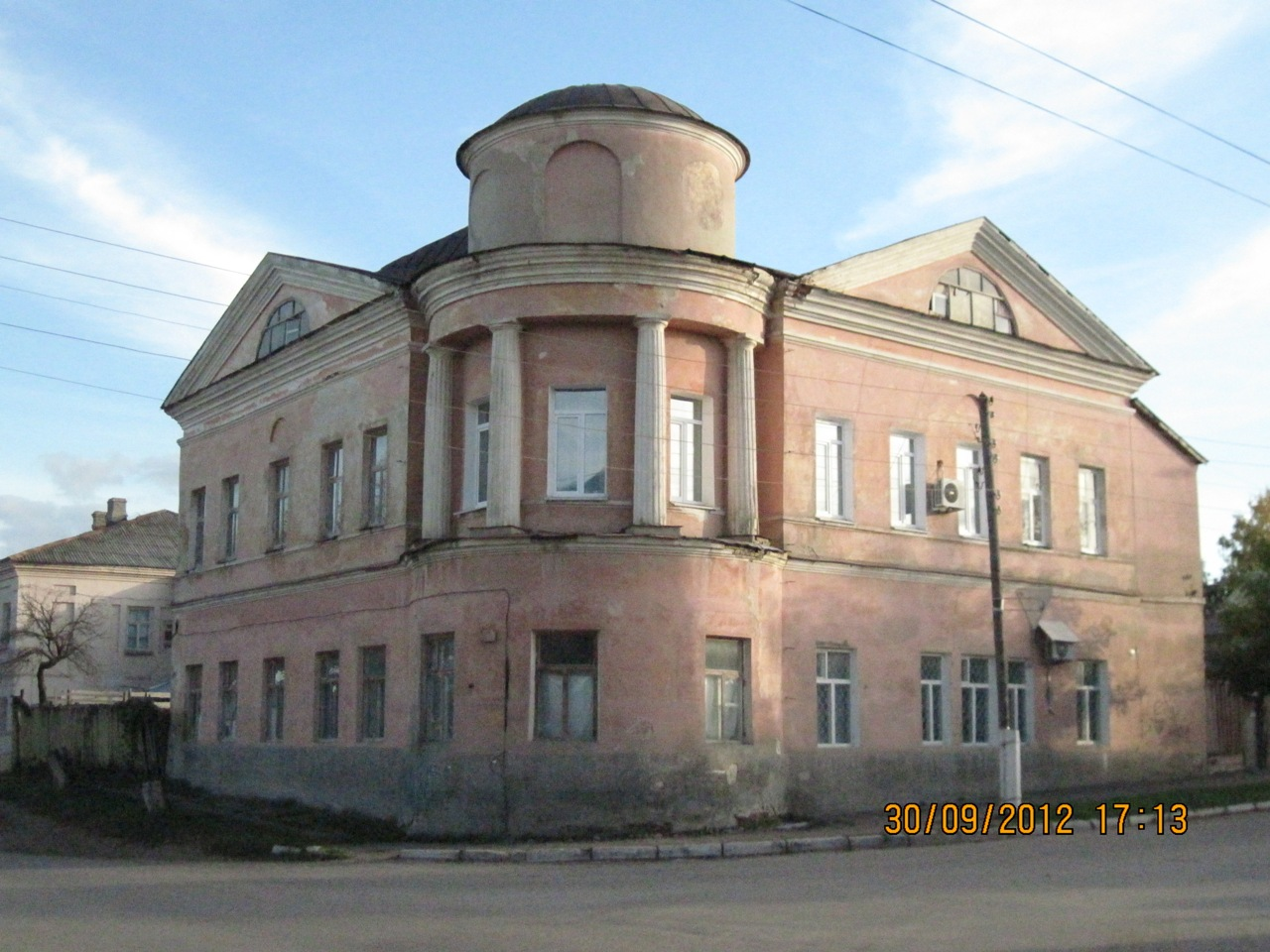 Г. Вольск Чернышевского-65 дом Брюханова